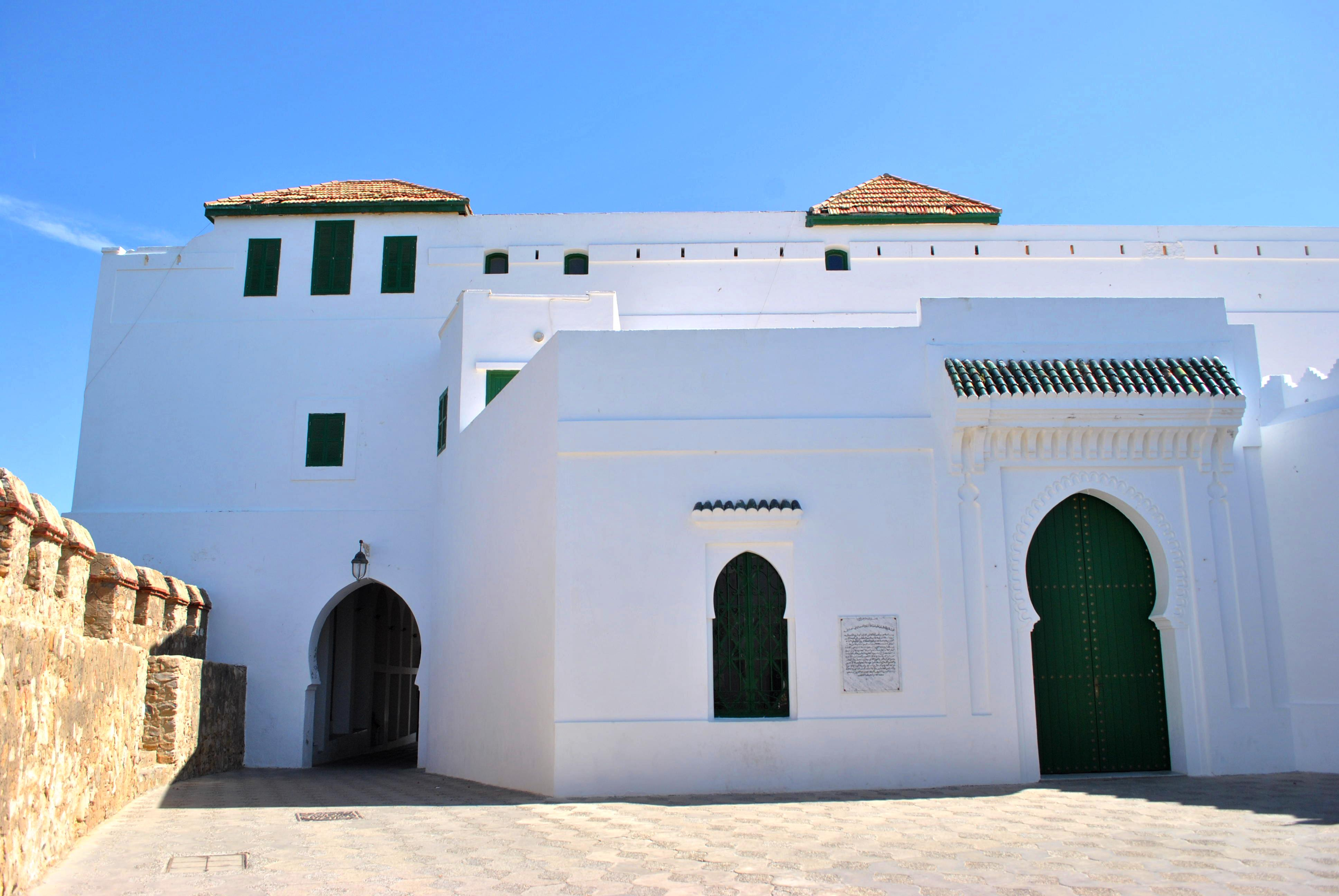 Palais de Raïssouli